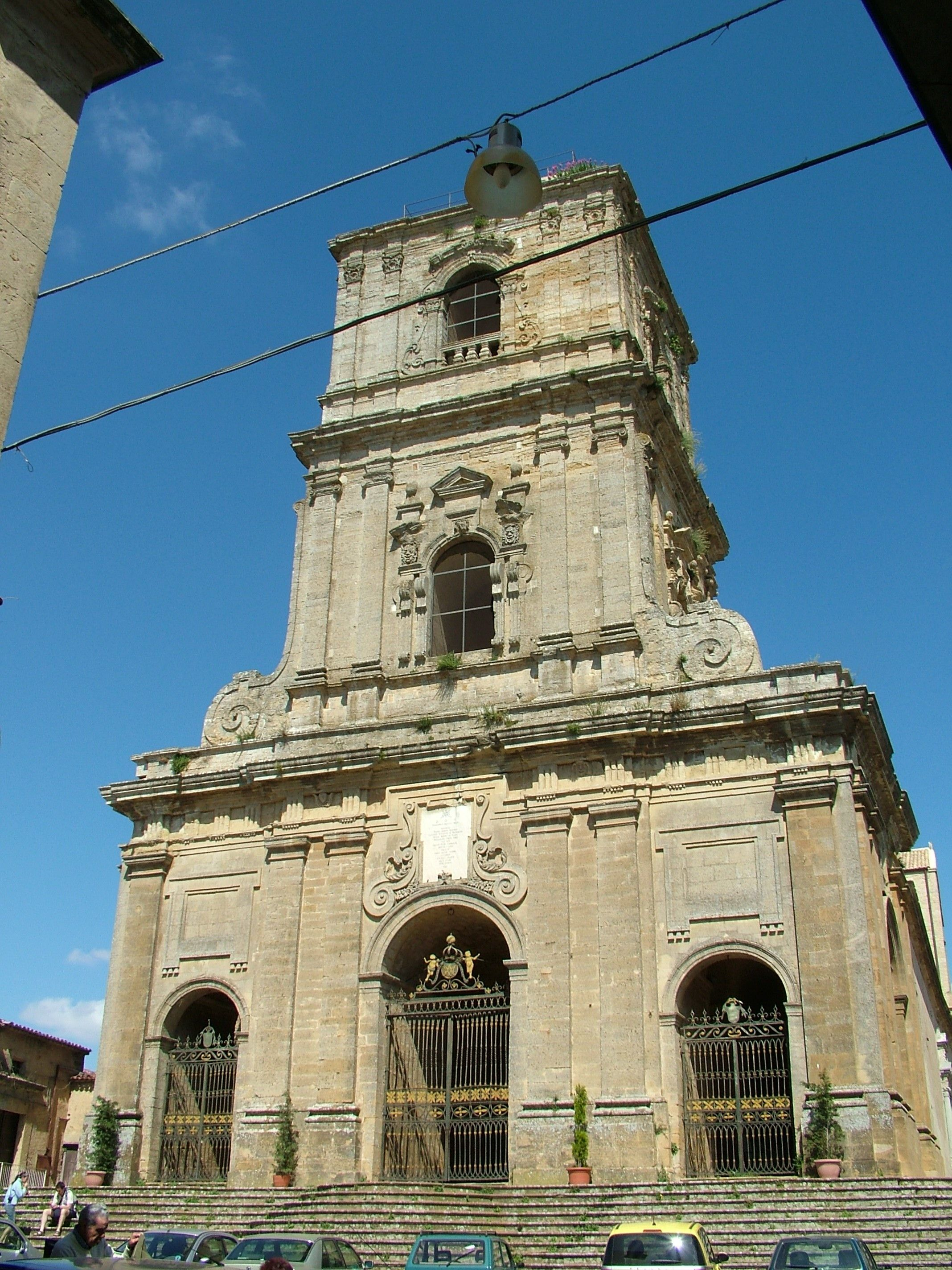 Enna, Sizilien, die Fassdae des Domes